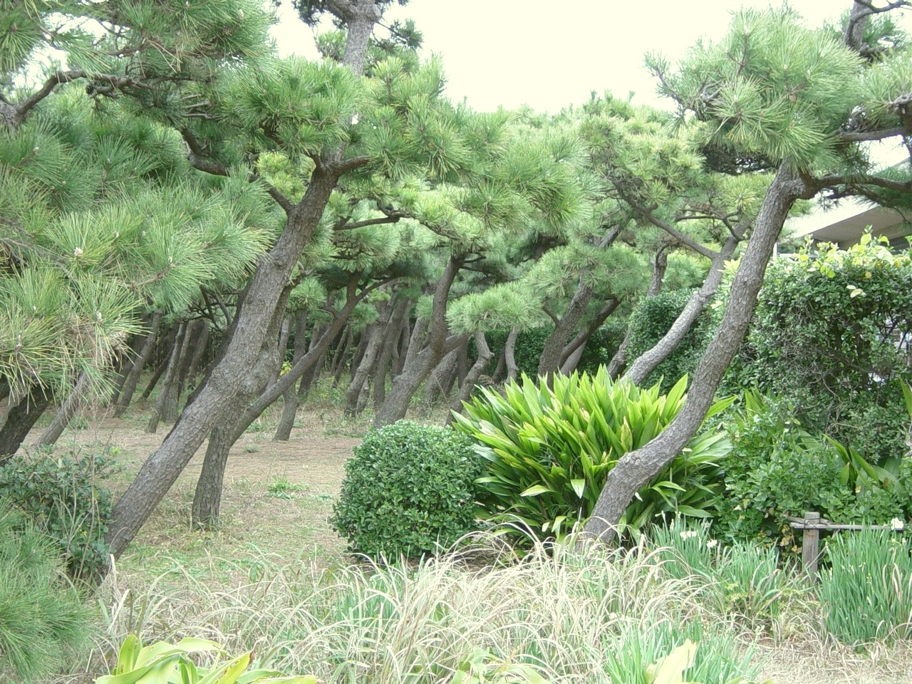 This picture has been take in jougashima kanagawa japan.